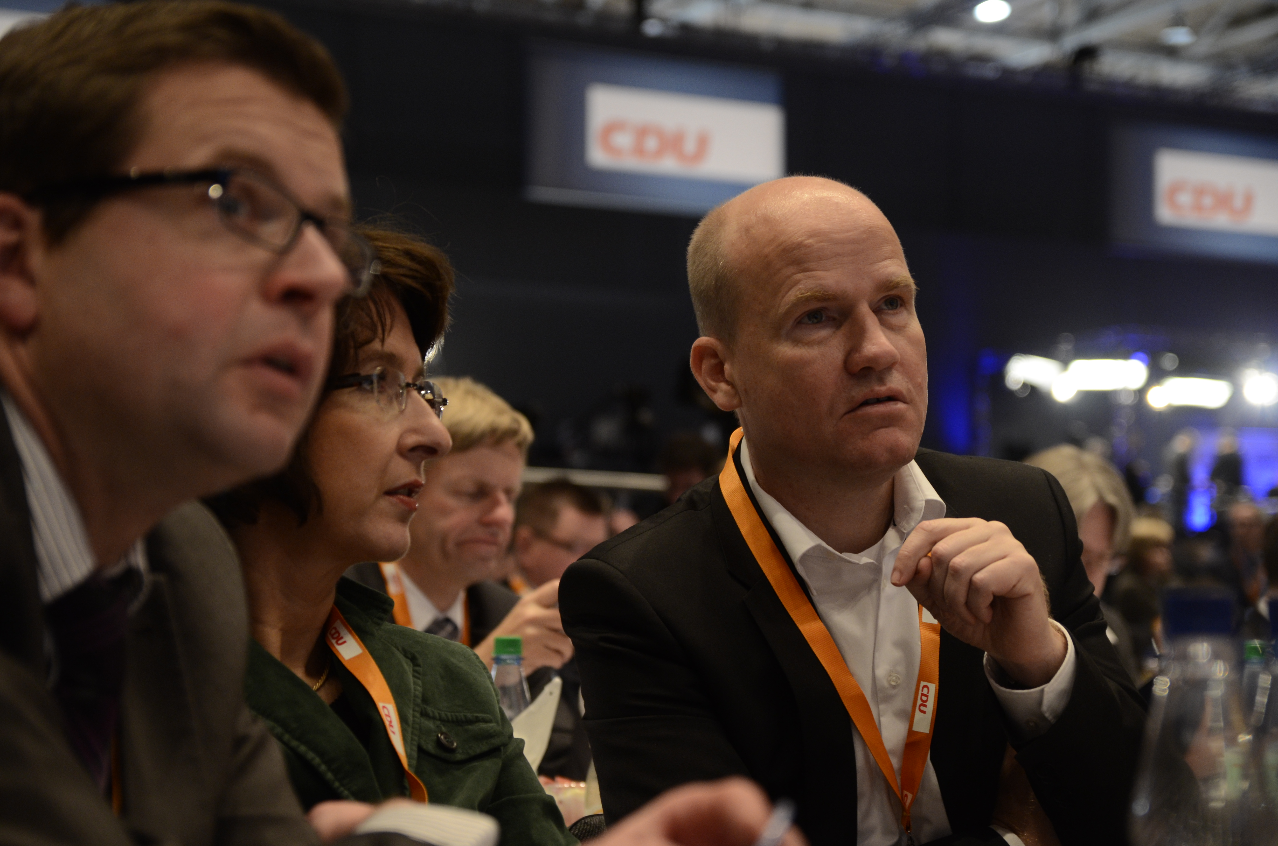 Ralph Brinkhaus auf dem CDU-Parteitag